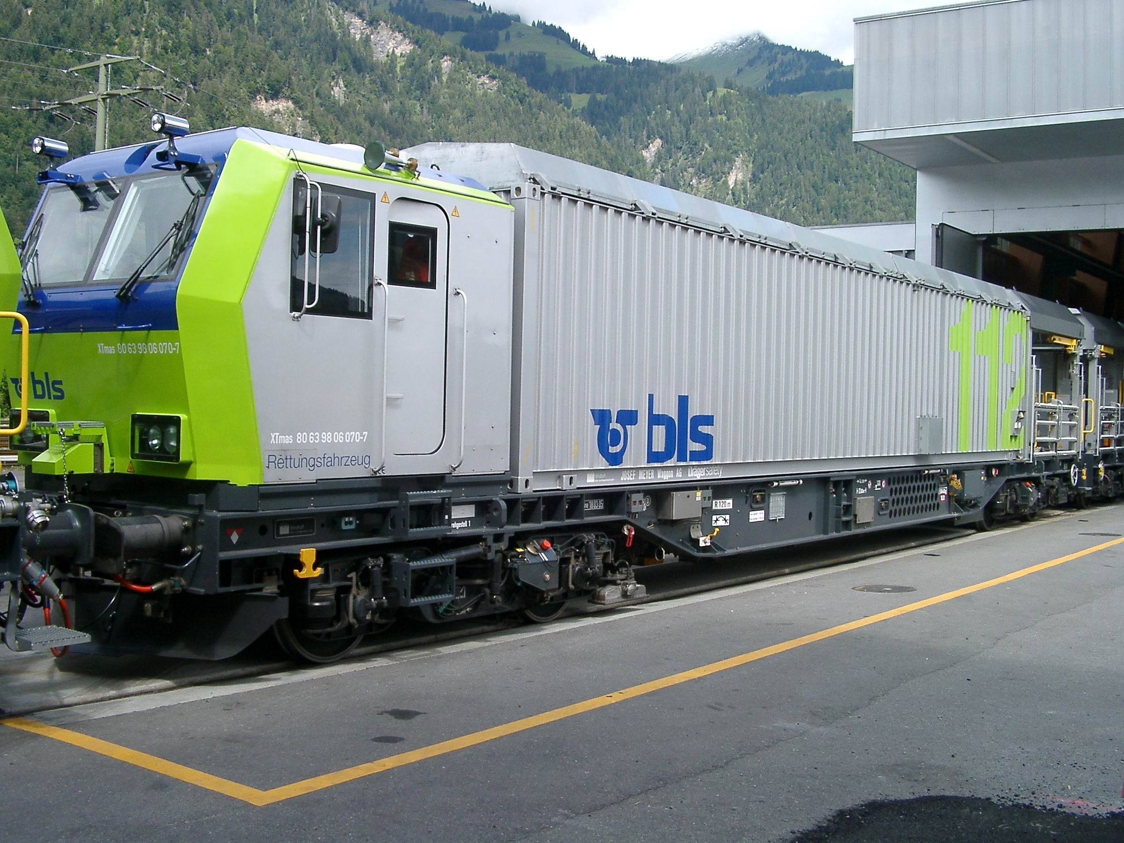 Lösch- und Rettungszug der BLS: Rettungsfahrzeug I